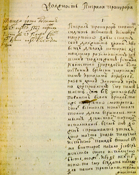 Указ о должности генерал-прокурора, 27 апреля 1722 г.